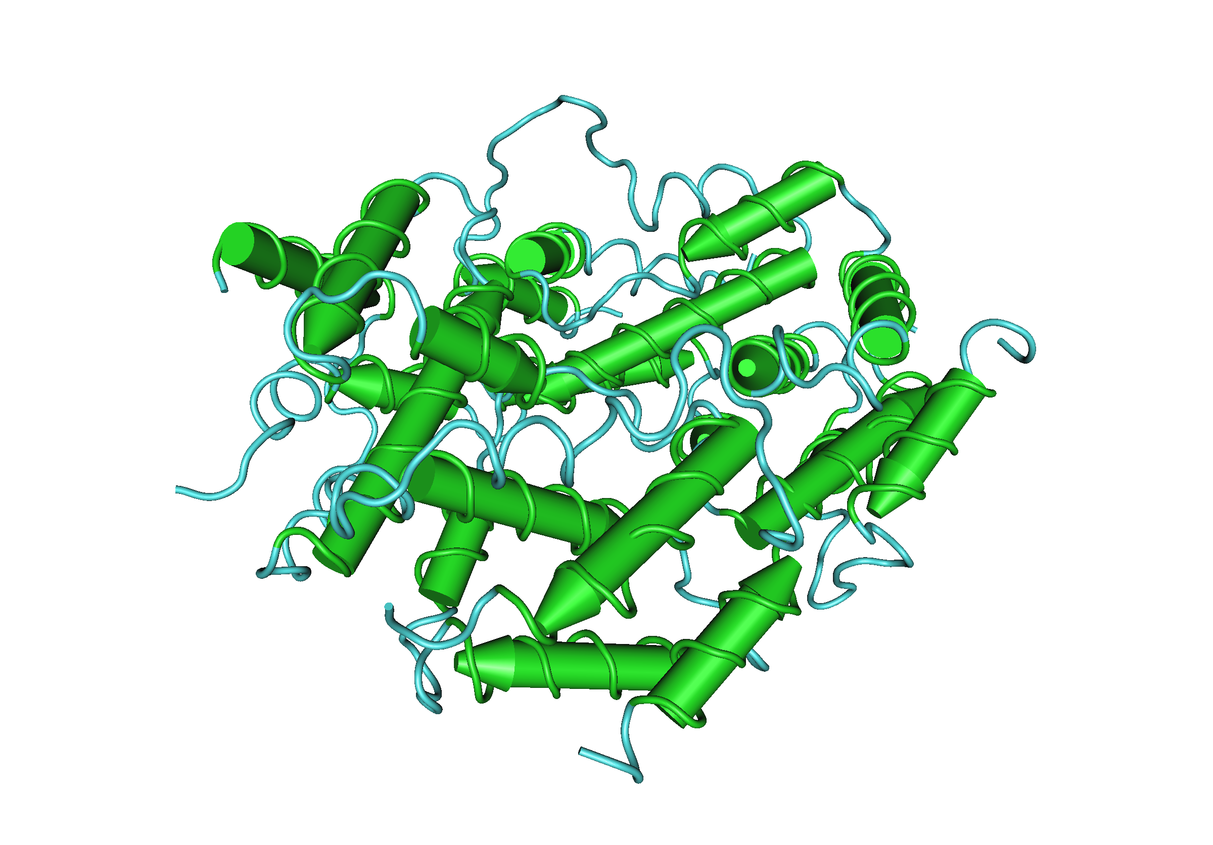 1HIG_Interferon-Gamma